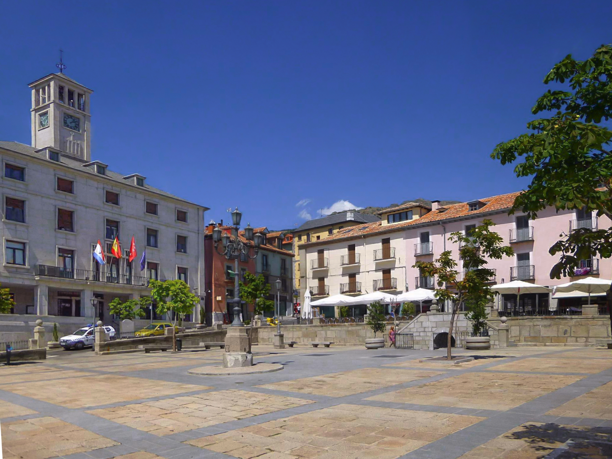 San Lorenzo de El Escorial - Plaza de la Constitución y Ayuntamiento